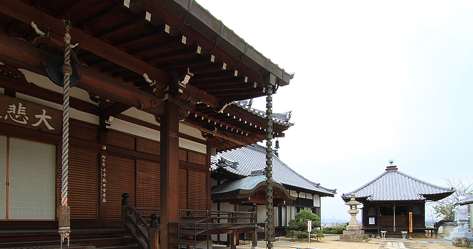 千手寺01